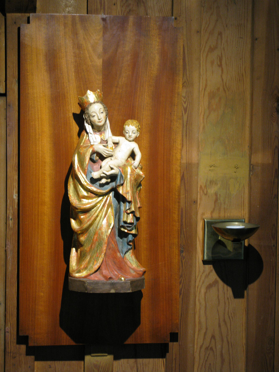 Maria - Lindenholzreplike der Schönen Gottesmutter von Breslau 1390